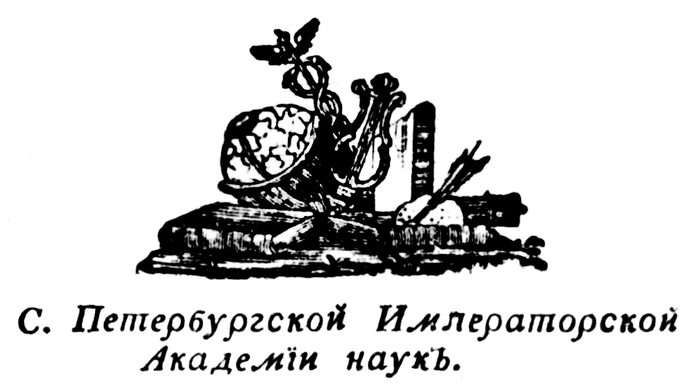 Логотип Санкт-Петербургской императорской академия наук